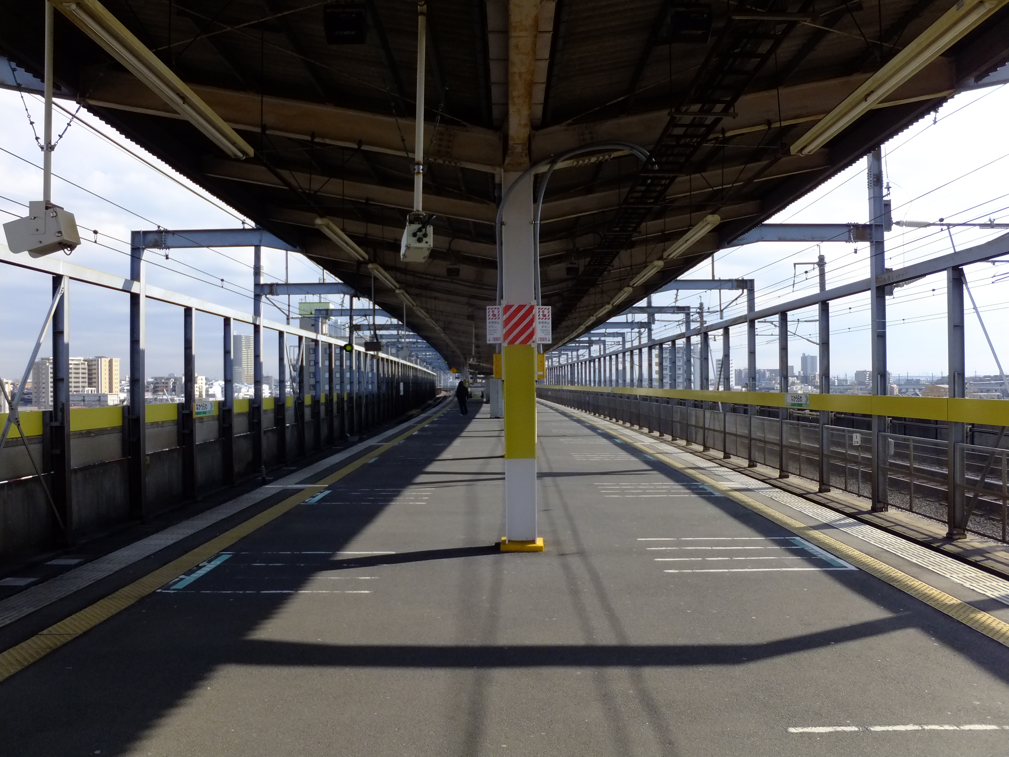 埼京線・中浦和駅プラットホーム